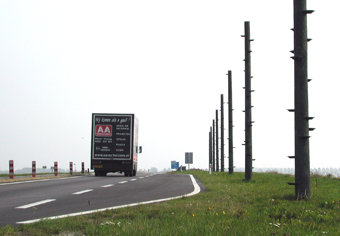 Debet & Credit - 1997 Materiaal: brons - 6,5 x 130 mtr. Locatie: naast wegracé autoweg N-207, tussen Hillegom en Schiphol. Kruising Hoofdvaart, gemeente Haarlemmermeer. Opdrachtgevers: Provincies Noord-Holland en Zuid-Holland en de gemeenten Hillegom en Haarlemmermeer. (Sculpture by Henck van Dijck.)